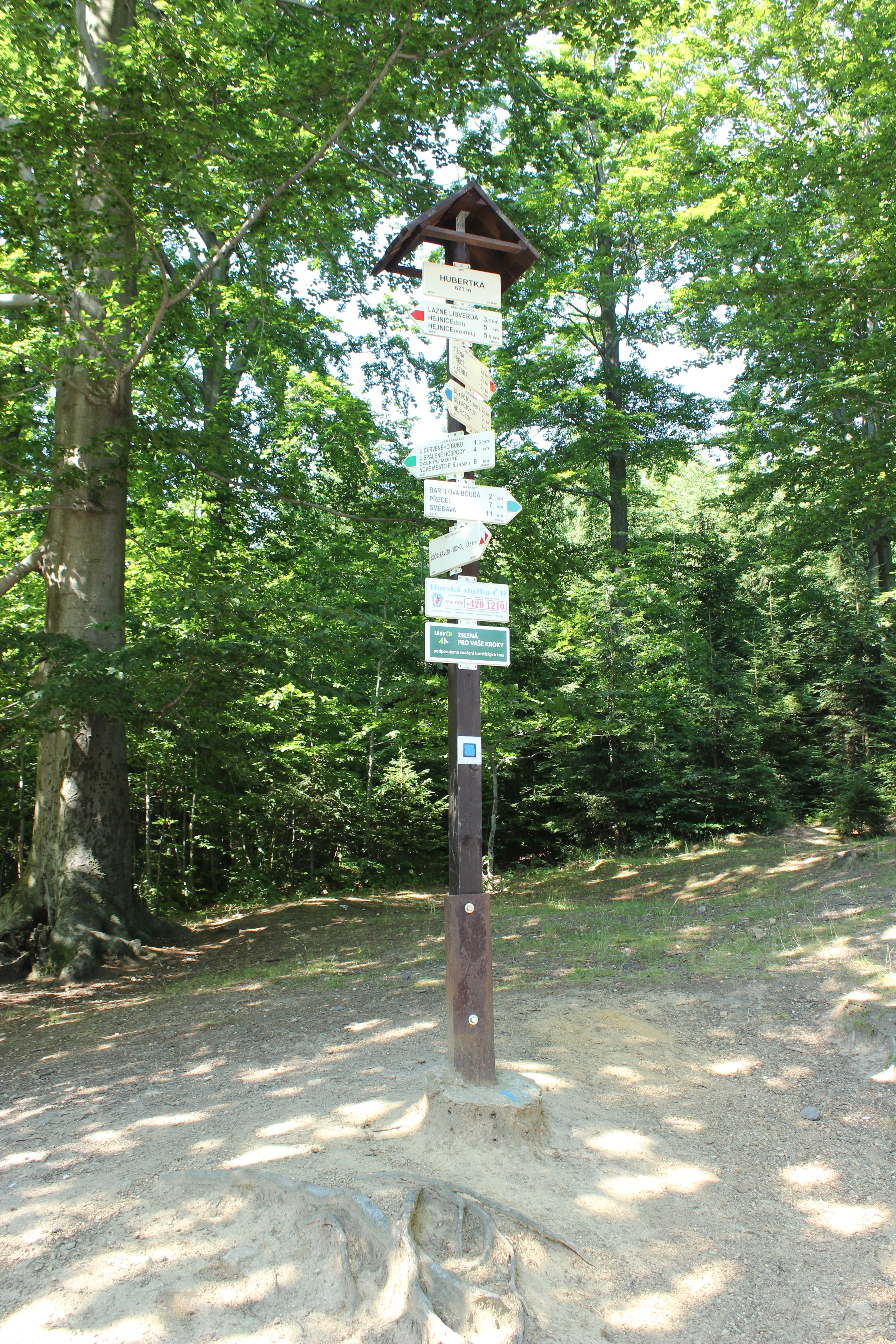 Rozcestník turistických cest u Hubertky.